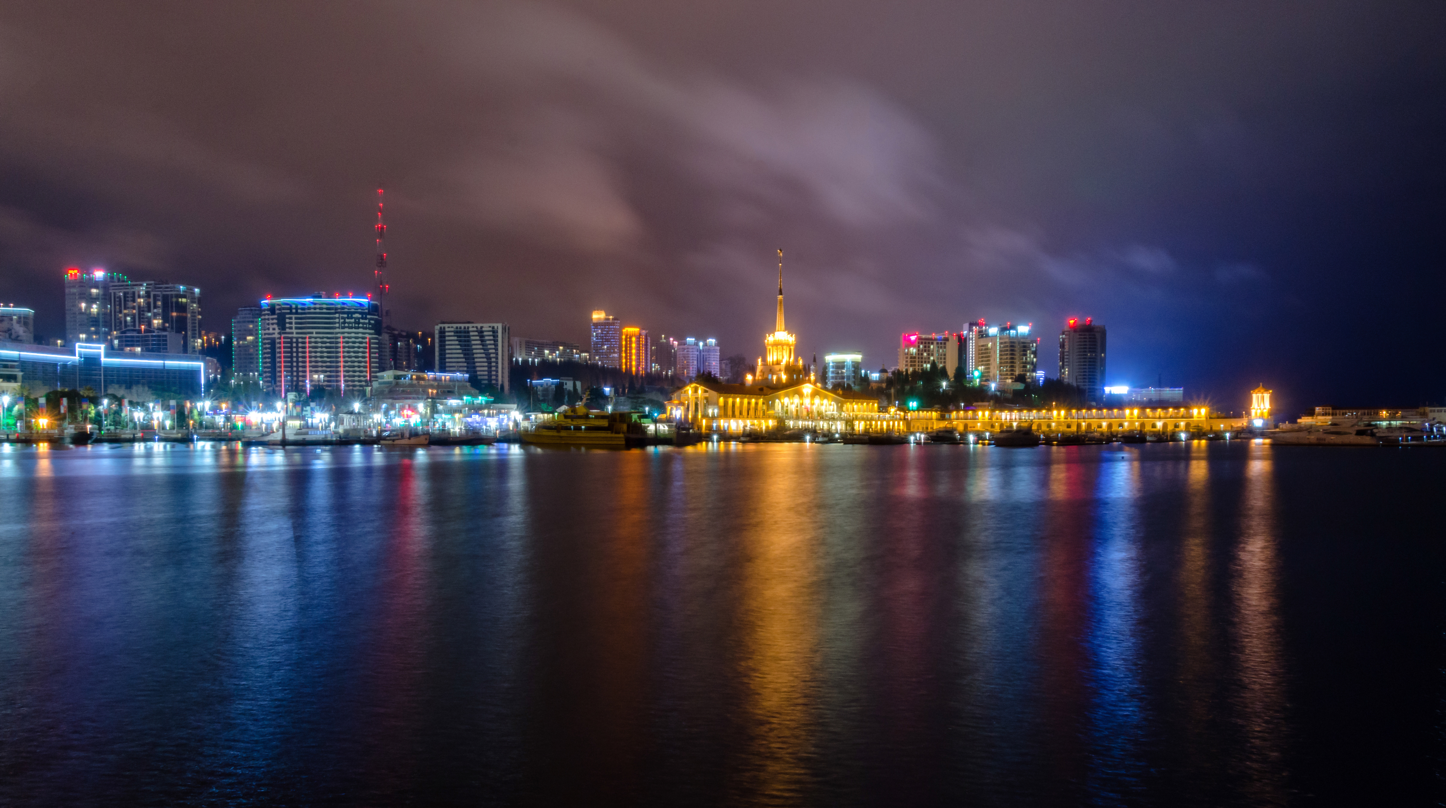 Морской вокзал: улица Войкова, 1, Центральный район, Сочи, Краснодарский край